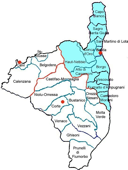 Arrondissement de Bastia, Haute-Corse. Division administrative, finage de l'arrondissement, cantons électoraux. Corsu: U circondu è a ghjura bastiaccia, cu i cantoni novi